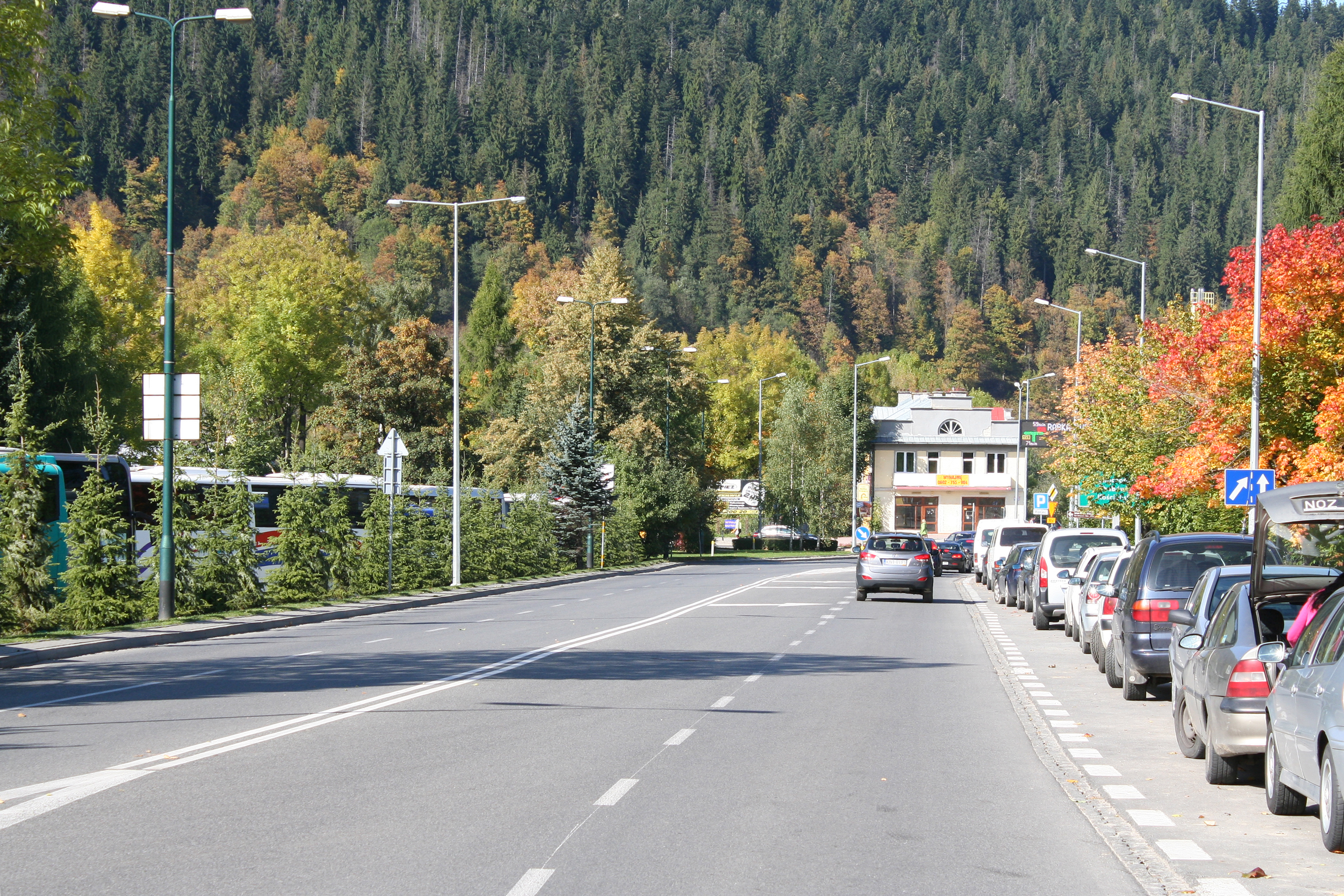 Aleja 3 Maja, Zakopane